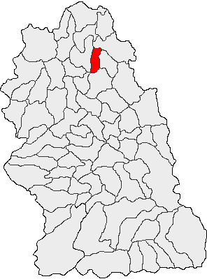 Categorie:Hărţi ale judeţului Hunedoara